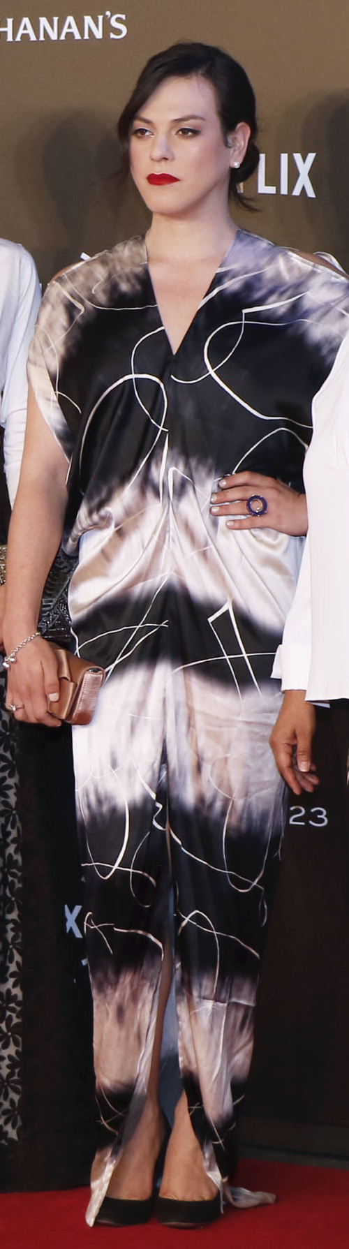 Miércoles 6 de diciembre de 2017 En el Teatro de la Ciudad Esperanza Iris, se realizó la 4ª Entrega del Premio Iberoamericano de Cine, Fénix, previo a la ceremonia, nominados, conductores, presentadores y elencos, desfilaron por la alfombra roja.Fotografía: Milton Martínez / Secretaría de Cultura CDMX